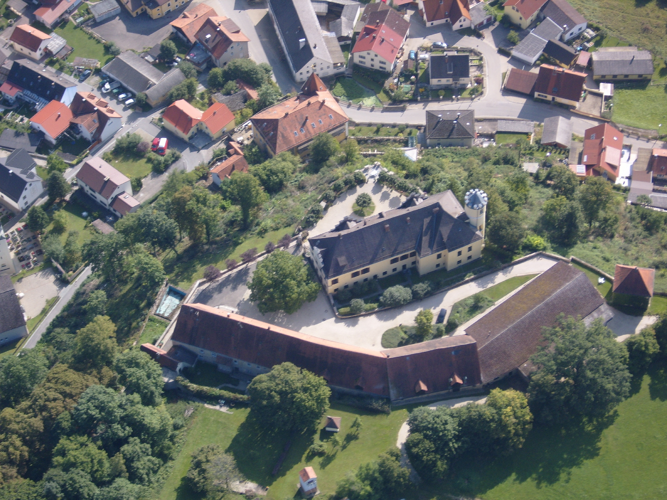 Herrn Lepper